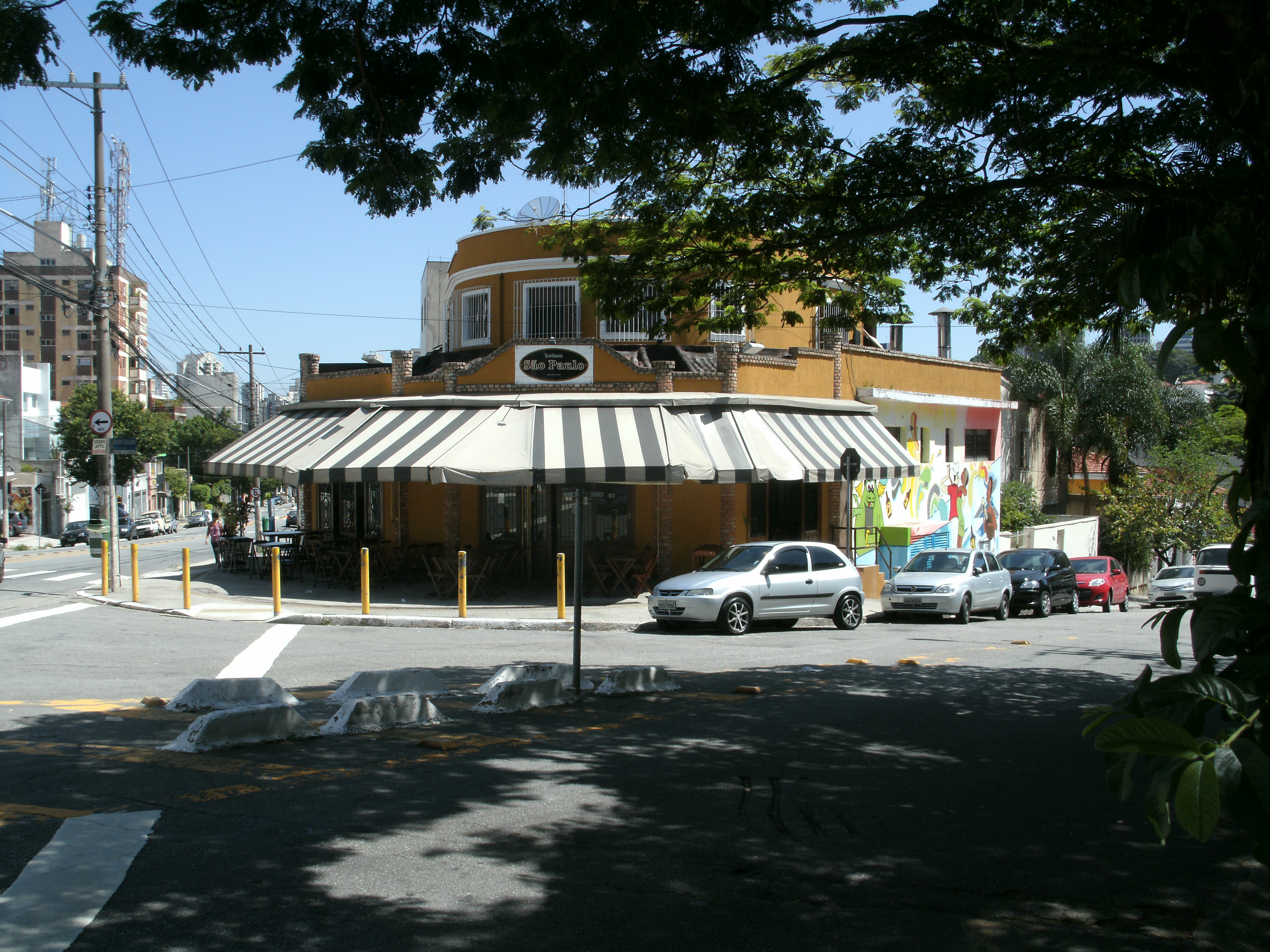 Boteco São Paulo - Av. Pompéia, 2.089